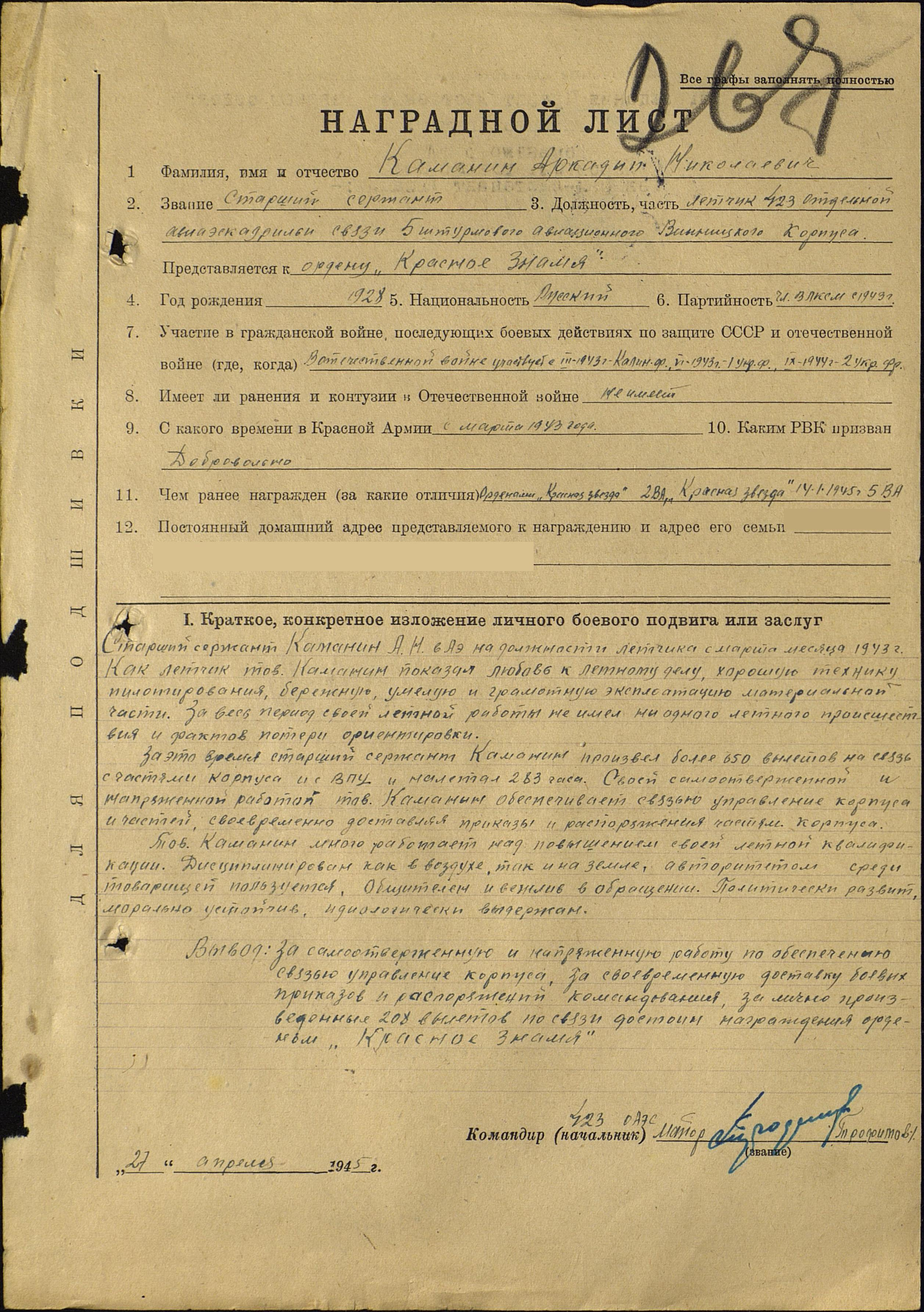 Наградной лист на представление к ордену "Красное знамя" Каманина Аркадия Николаевича, 1945